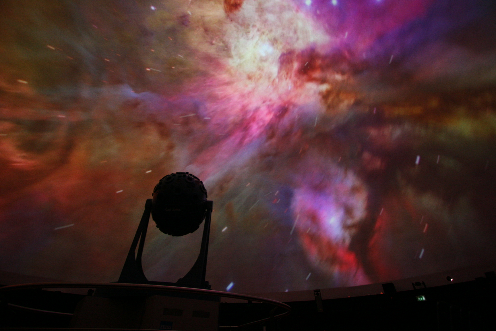 Der Andromedanebel in Laser-Ganzkuppelprojektion NICHT KORRECT - Orion Nebel!